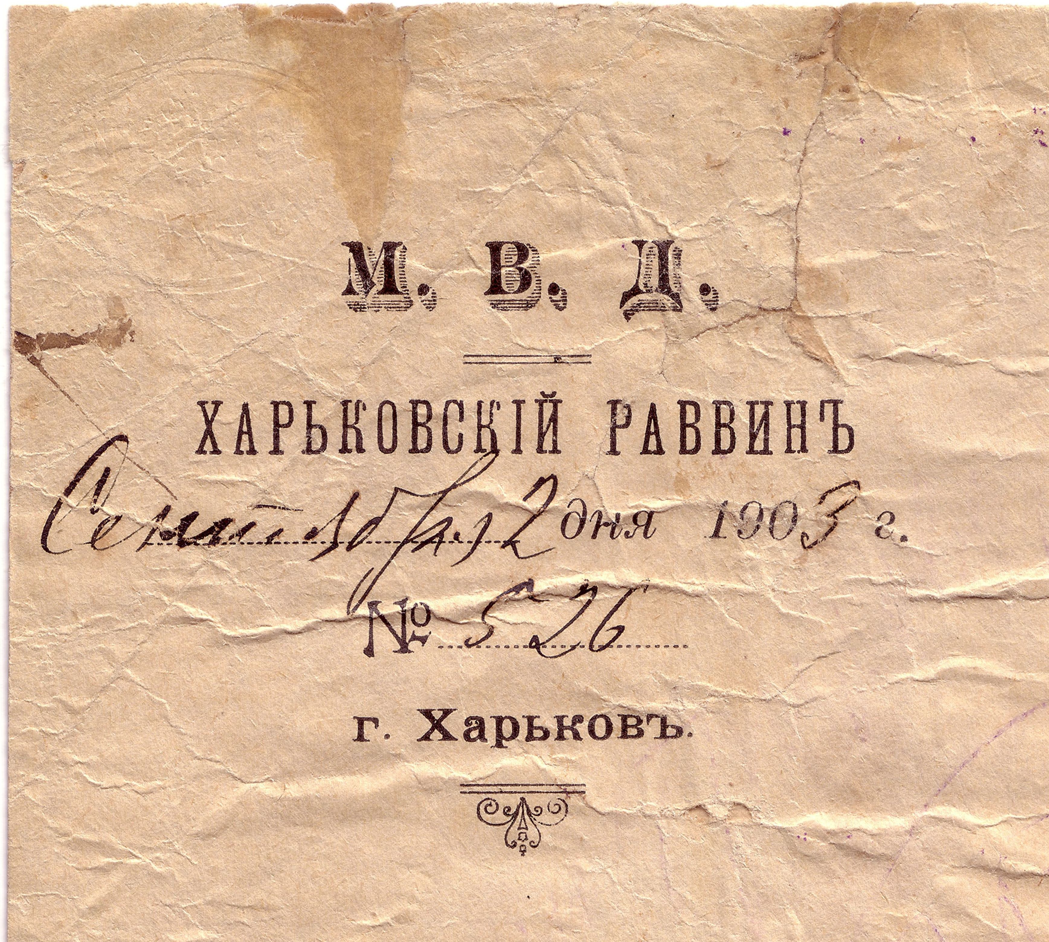 МВД Российской Империи. Угловой штамп раввина города Харькова. 1903 год.